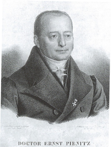 Эрнст Готтлоб Пиениц